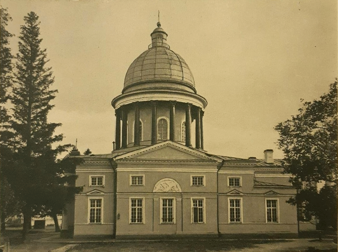 Андреевский собор в усадьбе Грузино Чудовского района, Новгородской области